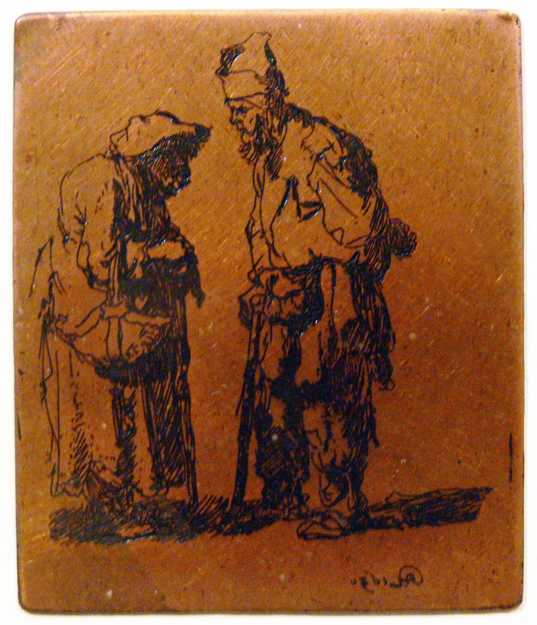 Rembrandt, plaque gravée à l'eau-forte, Mendiant parlant à une mendiante, 1630. Bartsch 164. Collection privée canadienne en dépôt à Amsterdam, Rembrandthuis